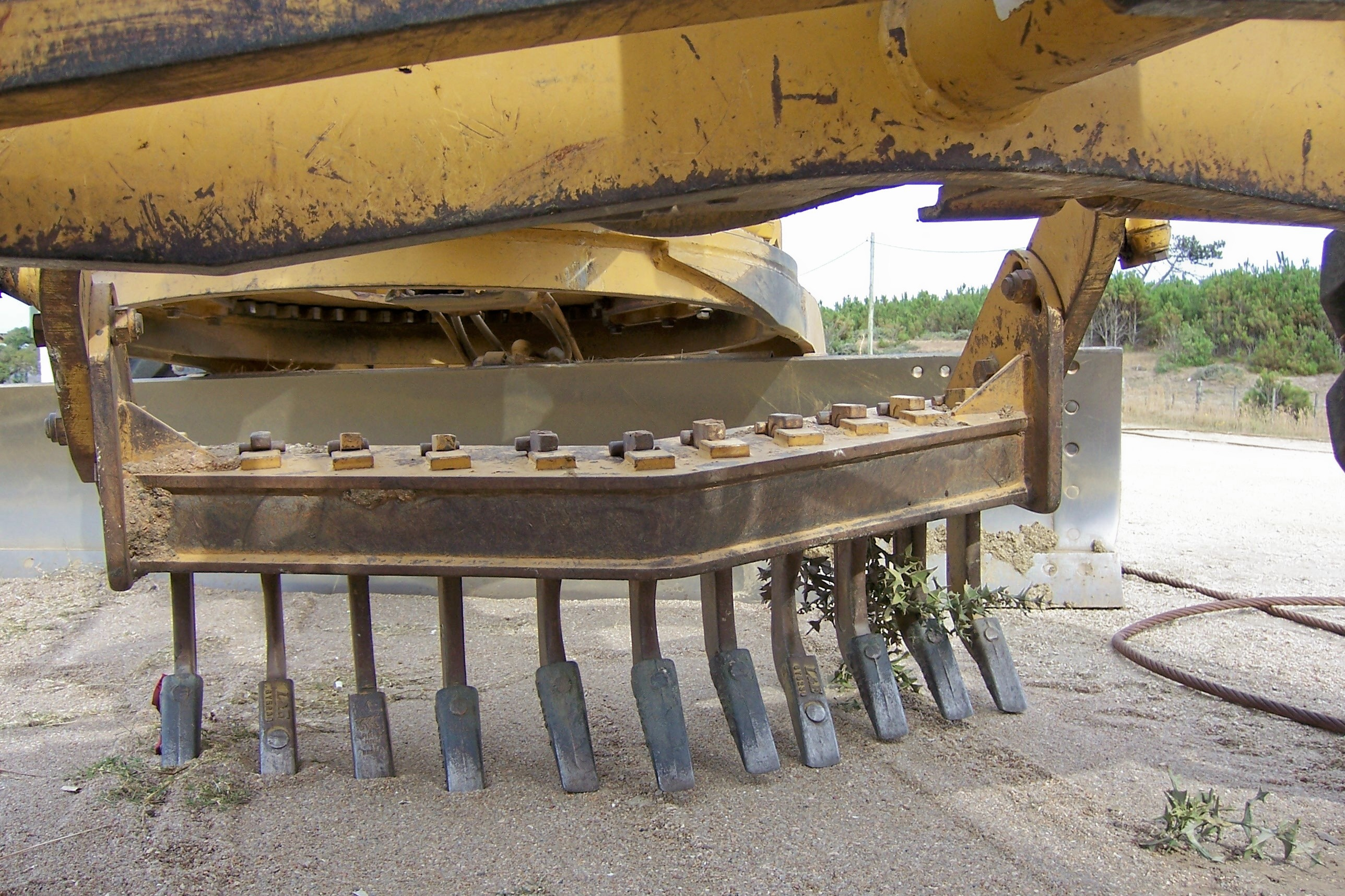 Motoniveladora